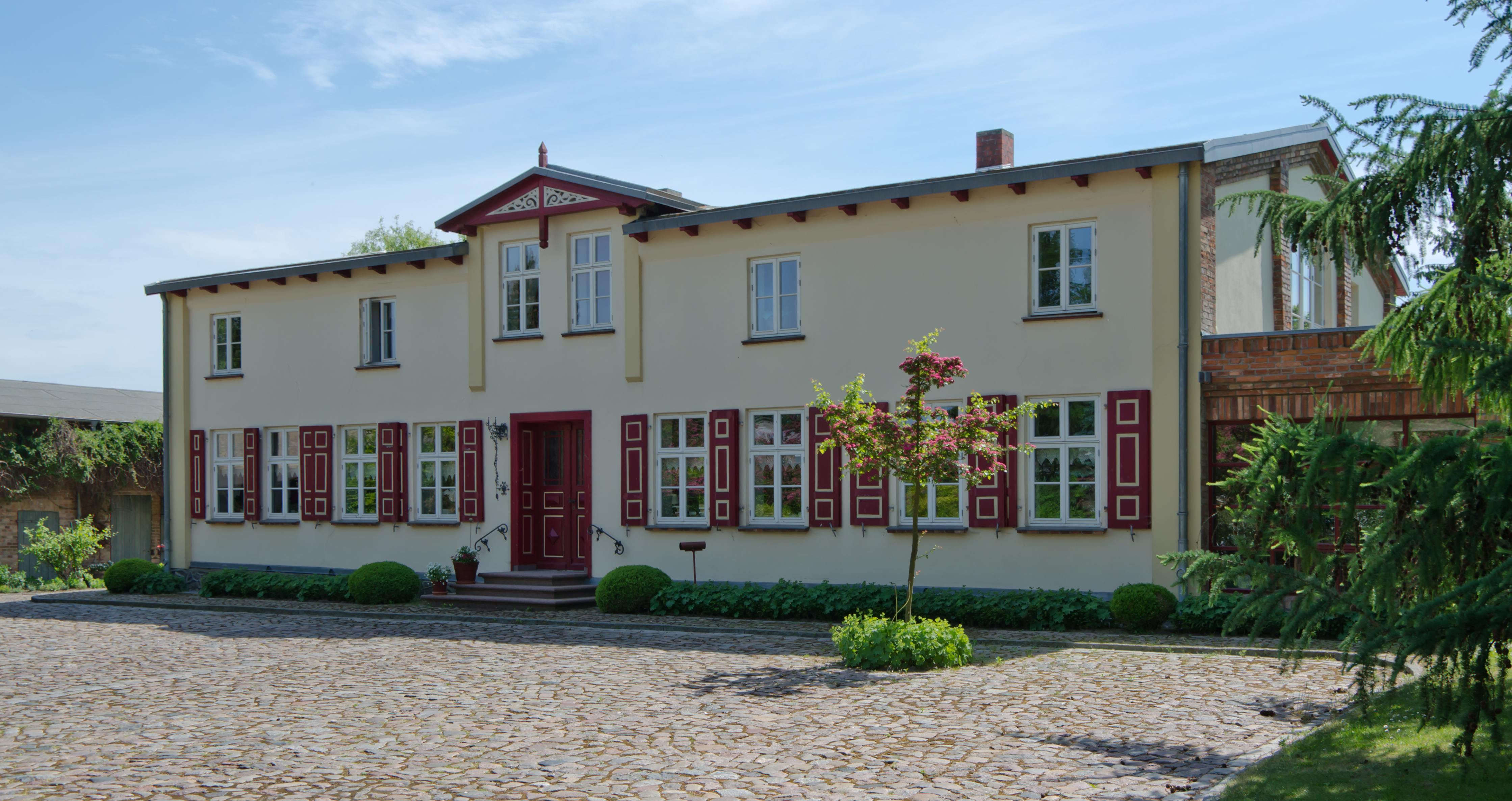 Denkmalgeschütztes Gebäude in der Hufe IV Papendorf